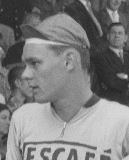 Start Ronde van Nederland Stadion Utrecht . Zwitserse ploeg (Nescafe) kopman Hugo Koblet